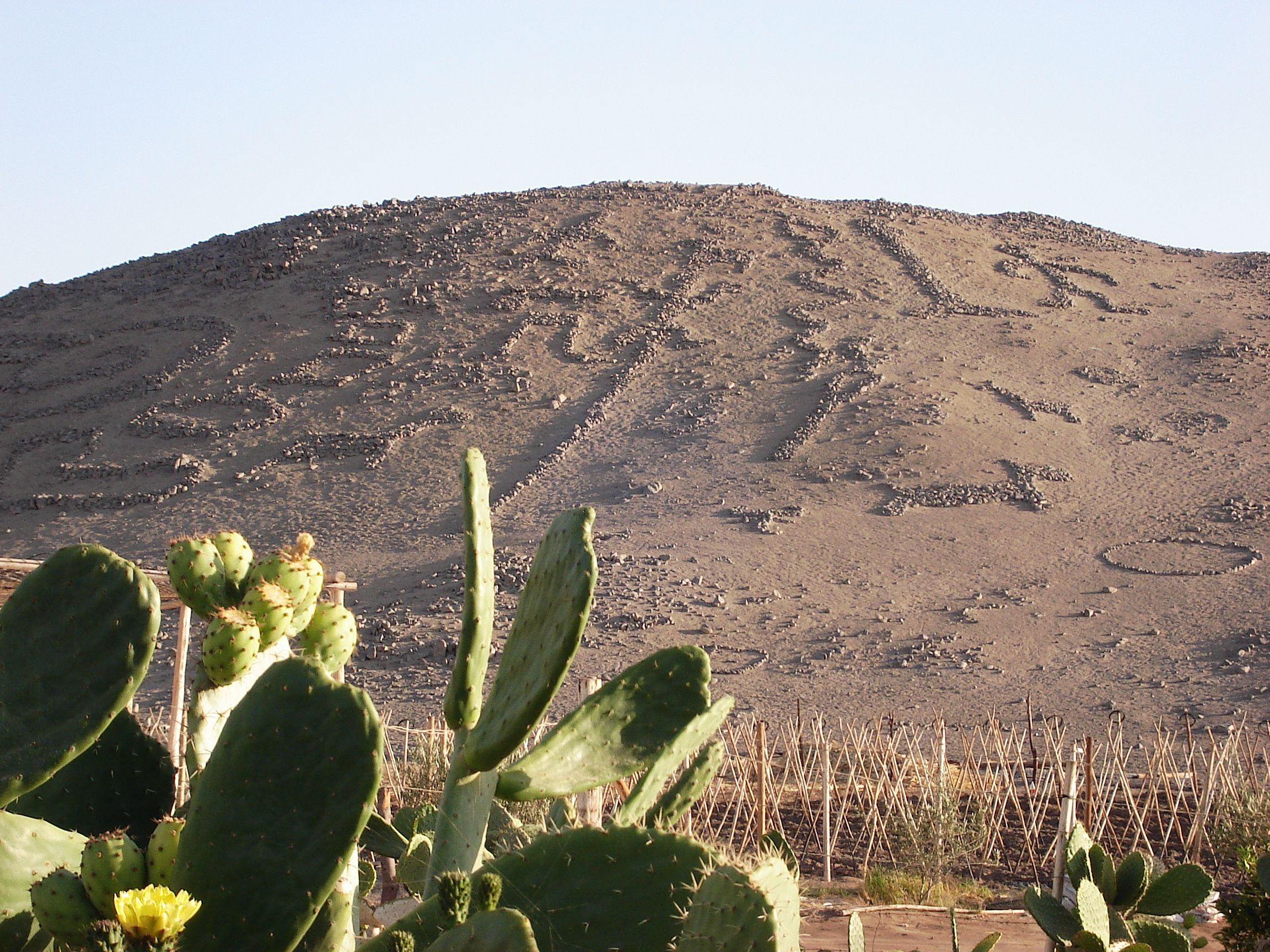 Foto tirada por mim, em Arica.